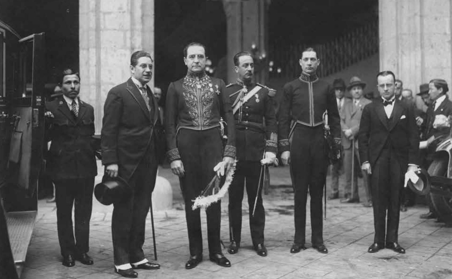 Labougle, ministro plenipotenciario argentino en México presentó sus credenciales ante el primer magistrado de ese país. Departamento Documentos Fotográficos. Inventario 49332.